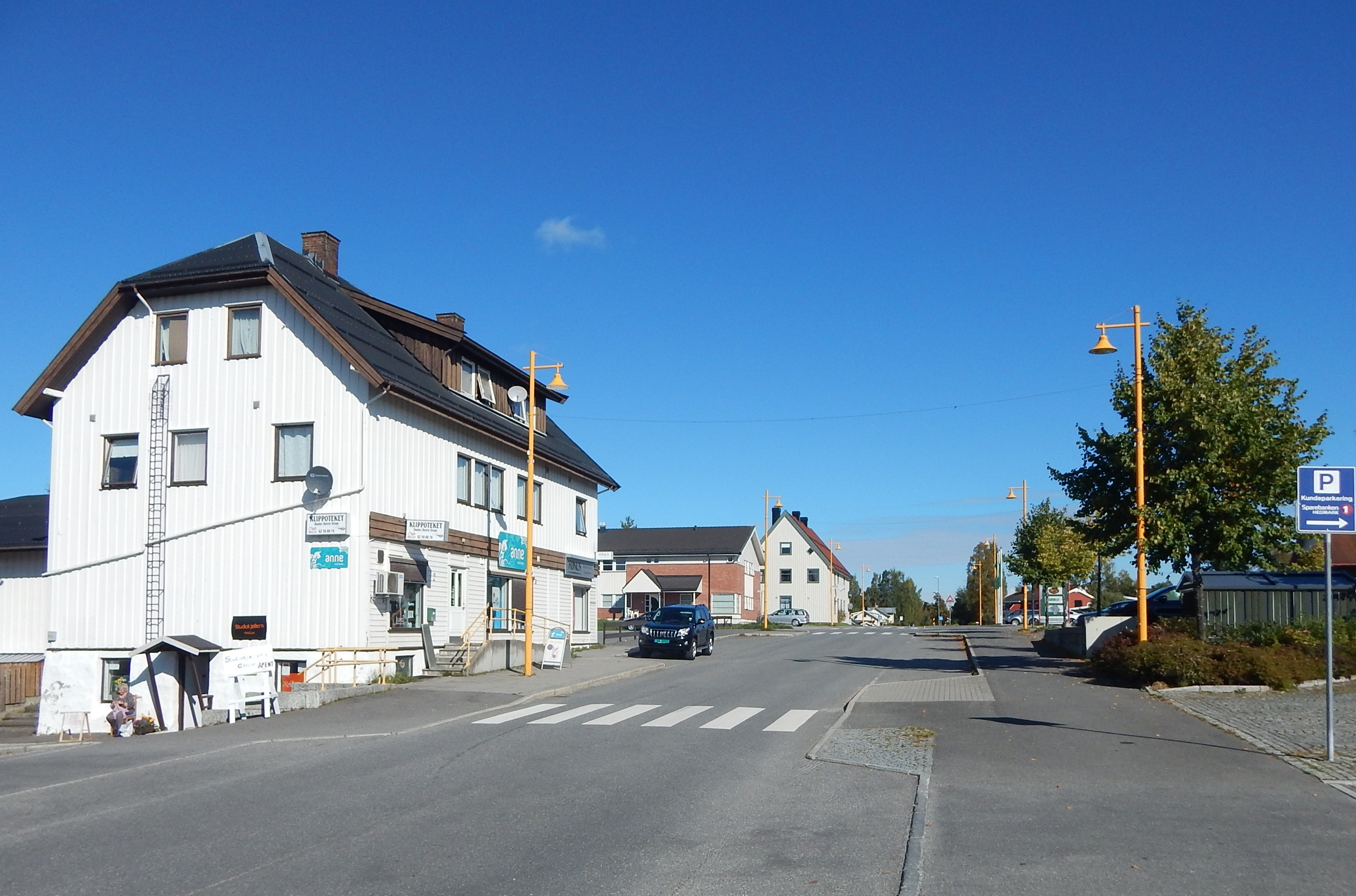 Meierivegen (fylkesvei 1846, tidl. 167) i Løten sentrum mot nordøst